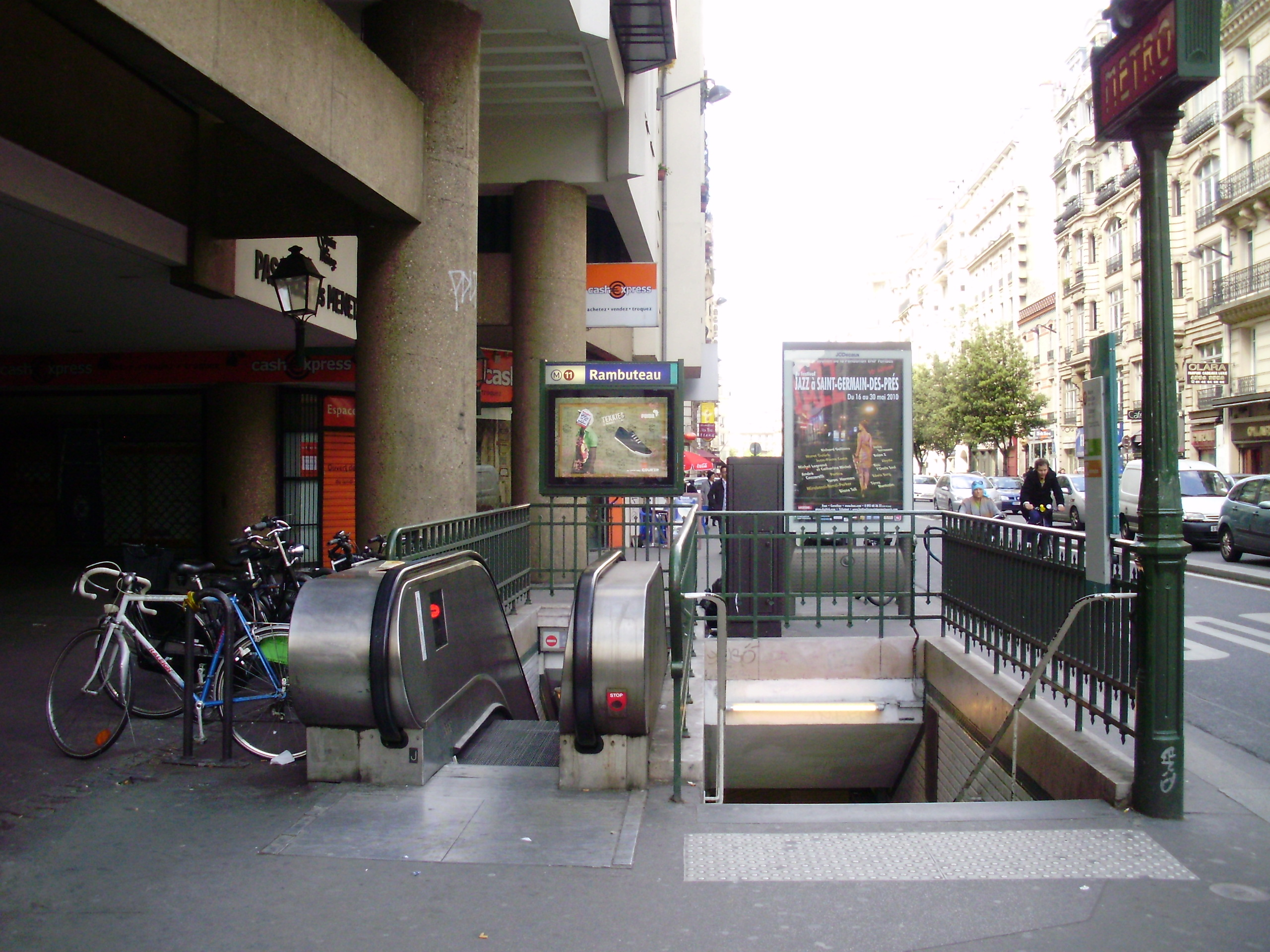 Accès à la station Rambuteau du métro de Paris